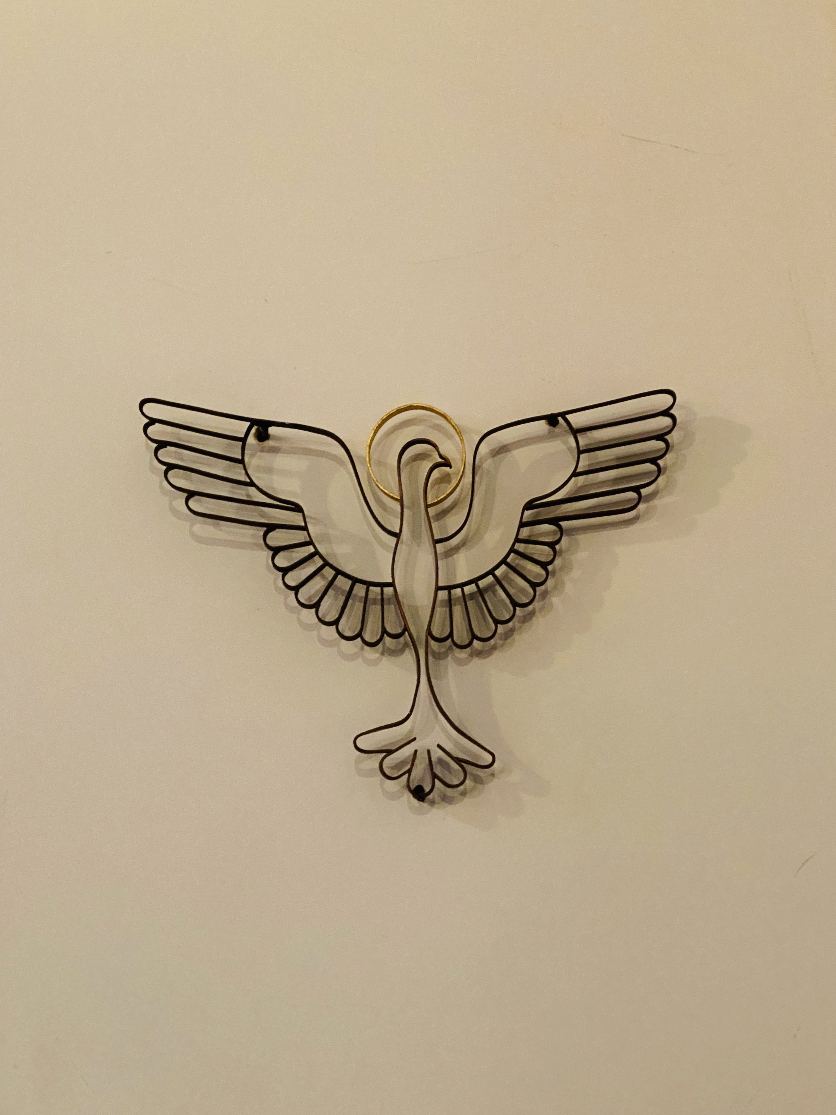 Friedenstaube repräsentiert den Heiligen Geist Inder Dreifaltigkeitskirche